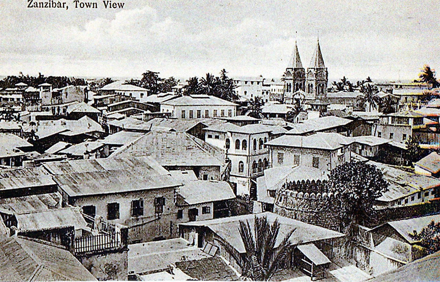 Veduta della vecchia città di Zanzibar